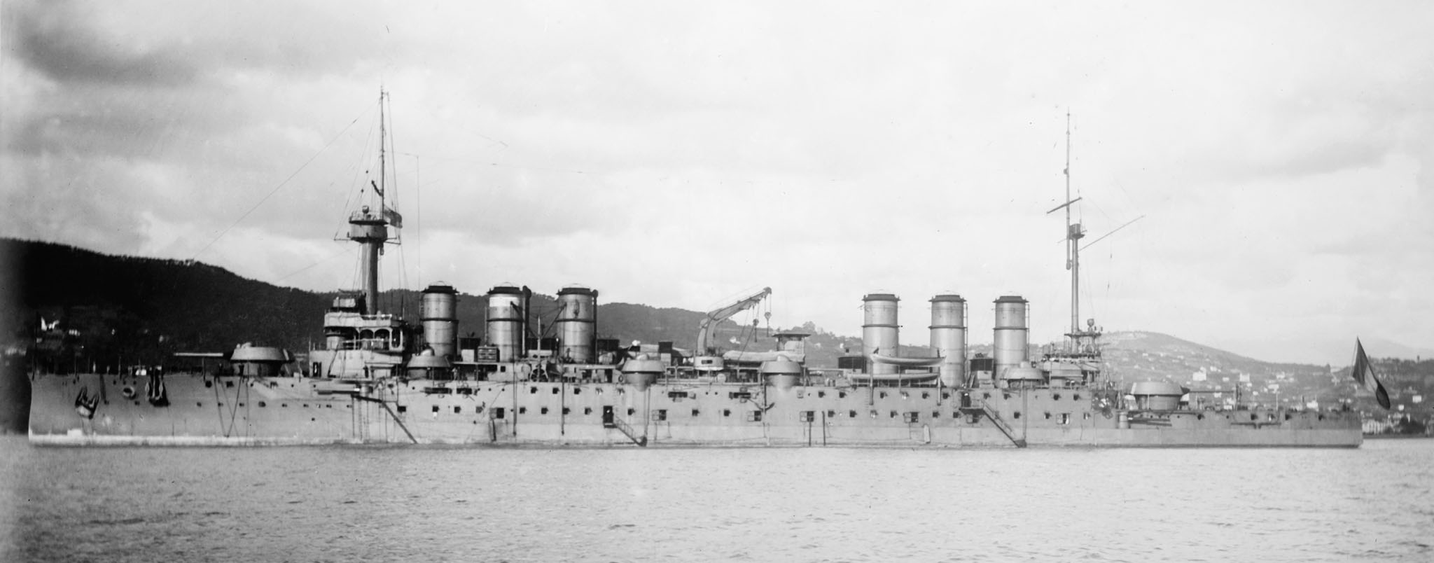 Ernest Renan (French ship)